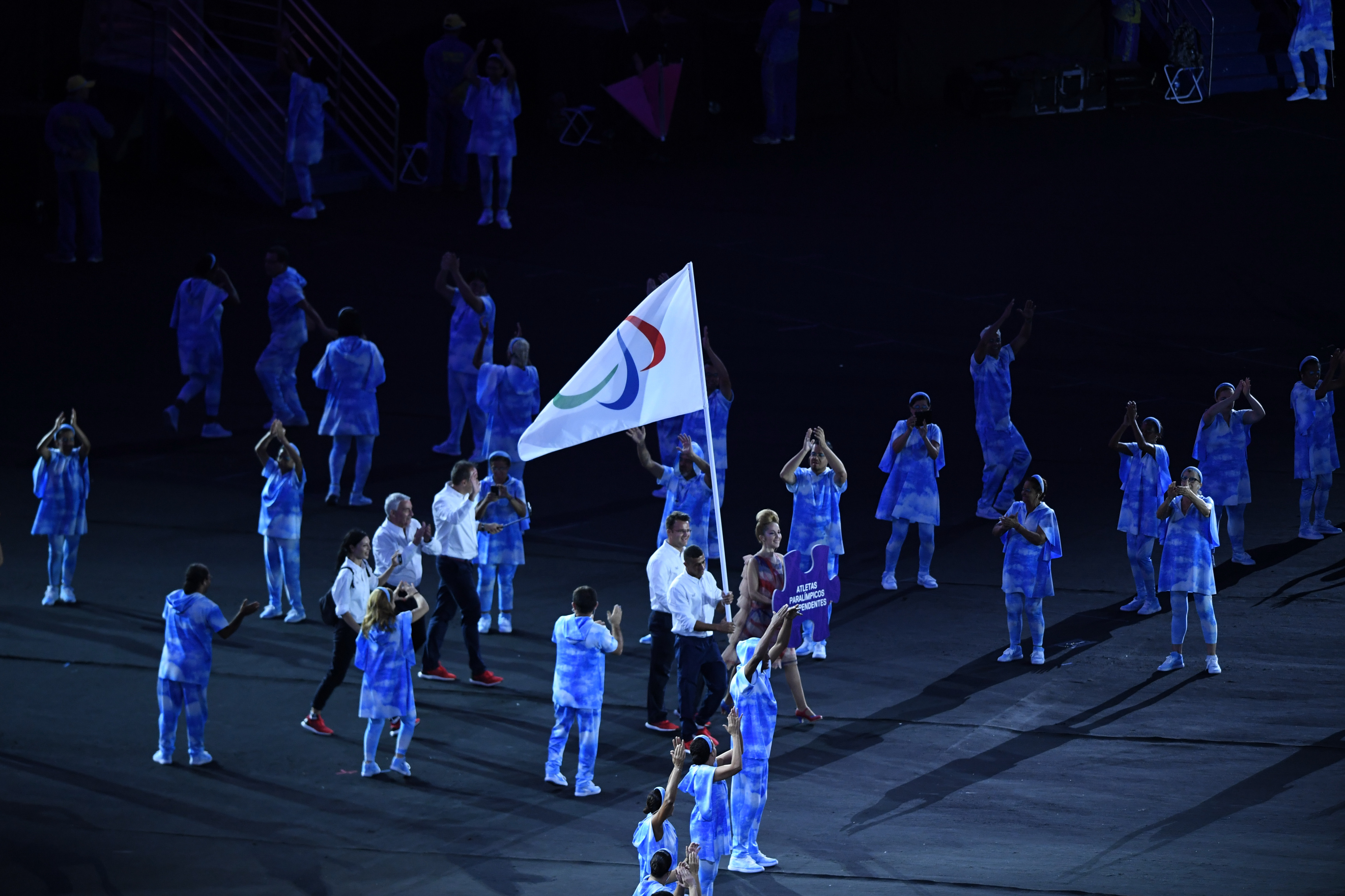 Rio de Janeiro - Cerimônia de abertura dos Jogos Paralímpicos Rio 2016 no Estádio do Maracanã